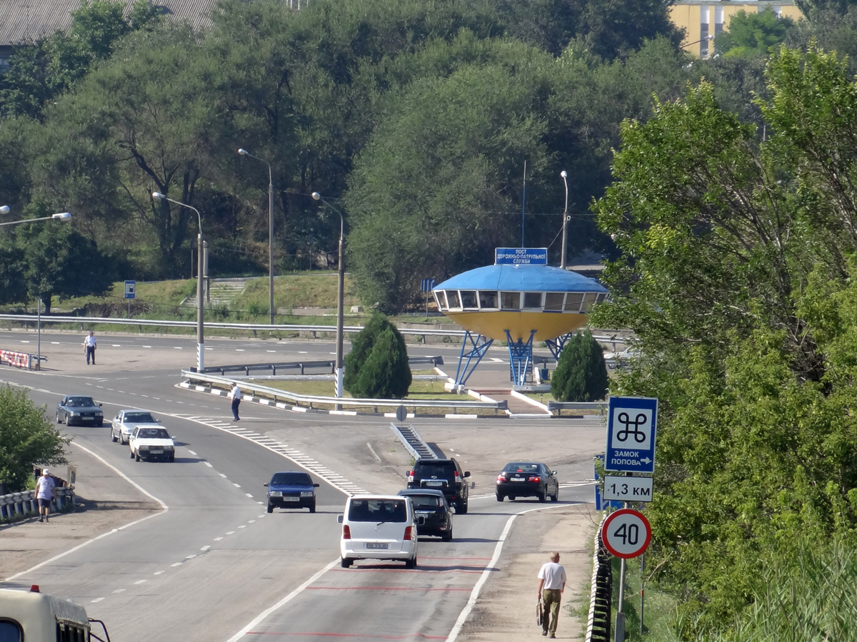 Осторожно здесь ГАИ останавливают без причин